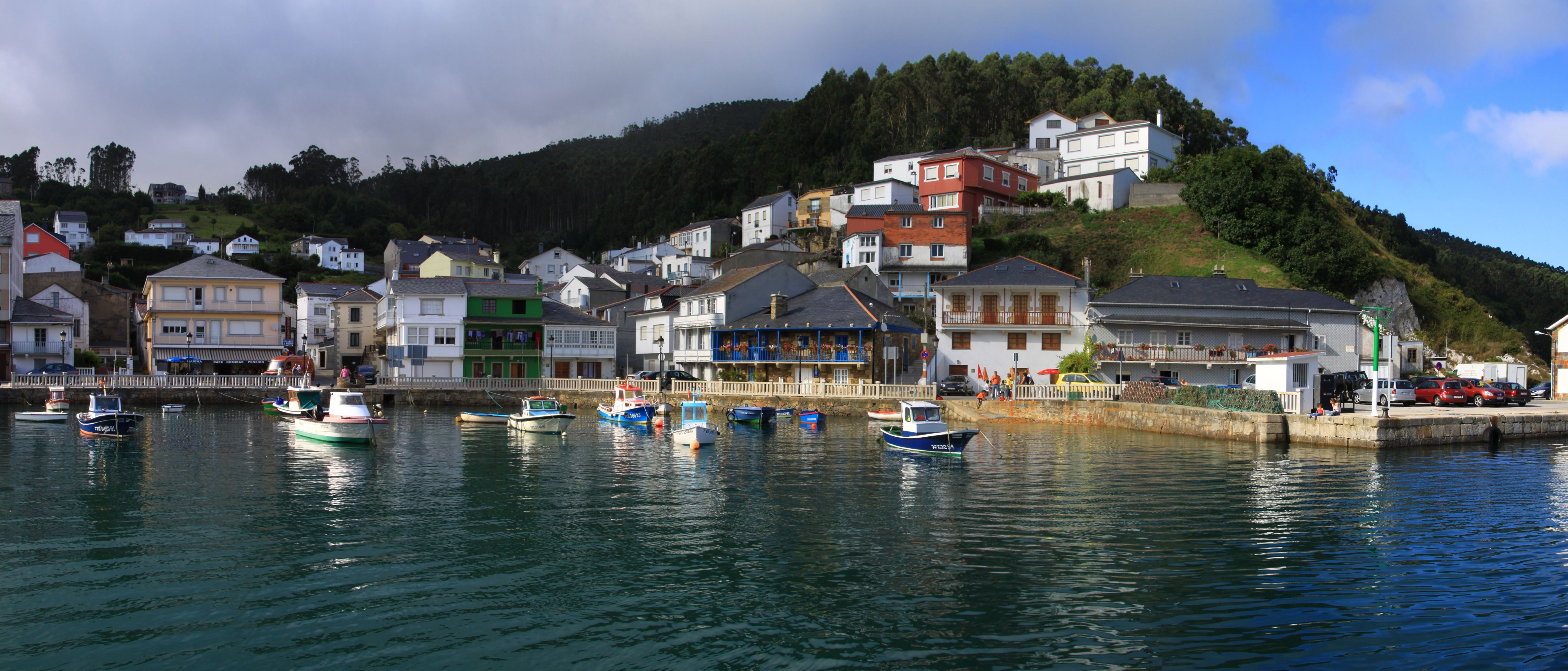 O Barqueiro, Mañón, Galiza. El poblado de O Barqueiro, con su limpio y pintoresco caserío abranzando su pequeño puerto, es una de las más típicas estampas del litoral septentrional gallego. El nombre del poblado tiene su origen en el barquero que trasladaba a personas y mercancías de uno a otro lado de la ría hasta el año 1901, en que se terminó el puente metálico que vemos hoy desde un nuevo viaducto.